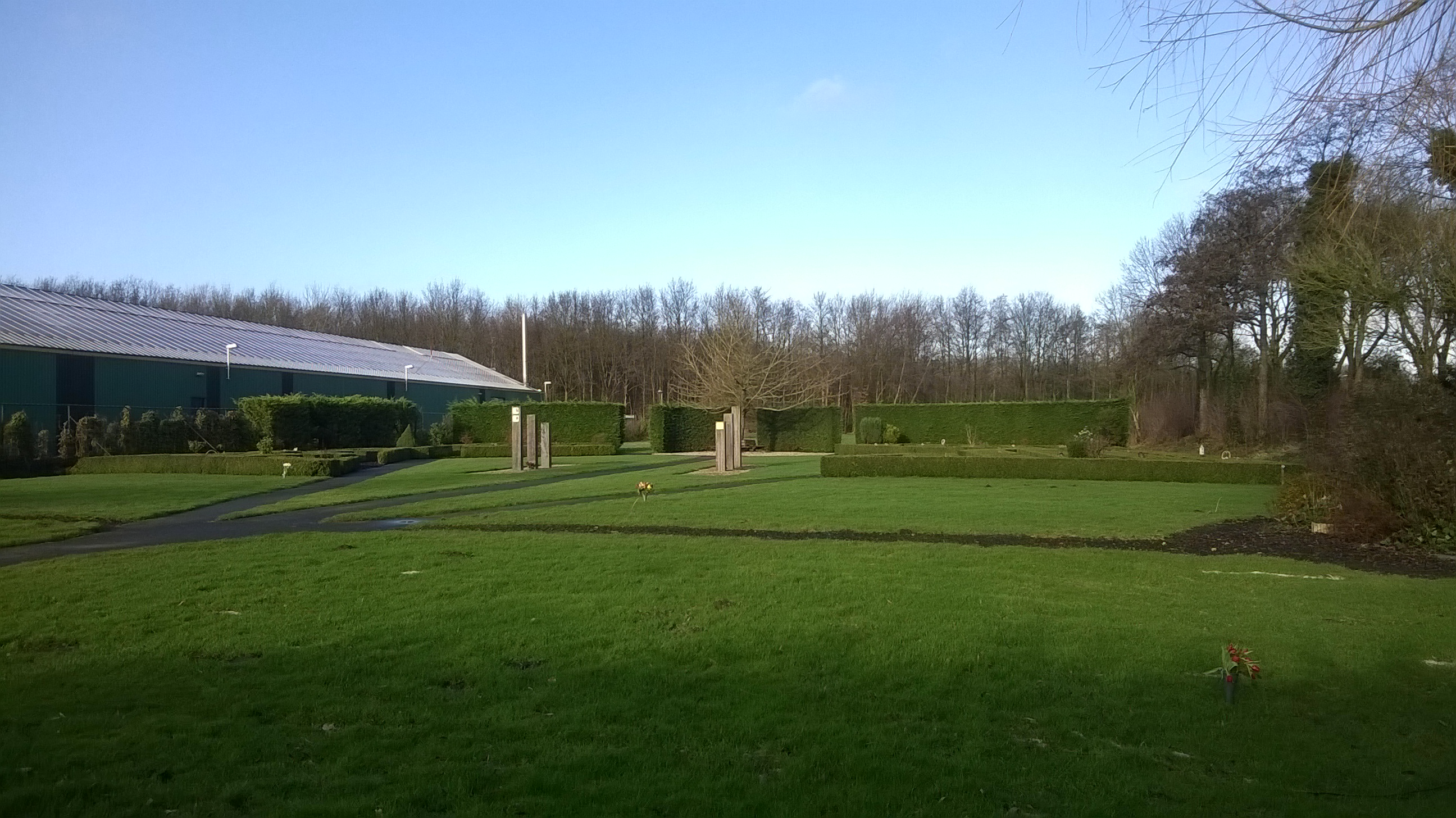 Strooiveld van Hollands Hof in Hoorn. Kleine monumentjes zijn toegestaan, in het midden een aantal houten pilaren waarop plaquettes geplaatst kunnen worden ter herinnering aan een of meerdere overledenen.